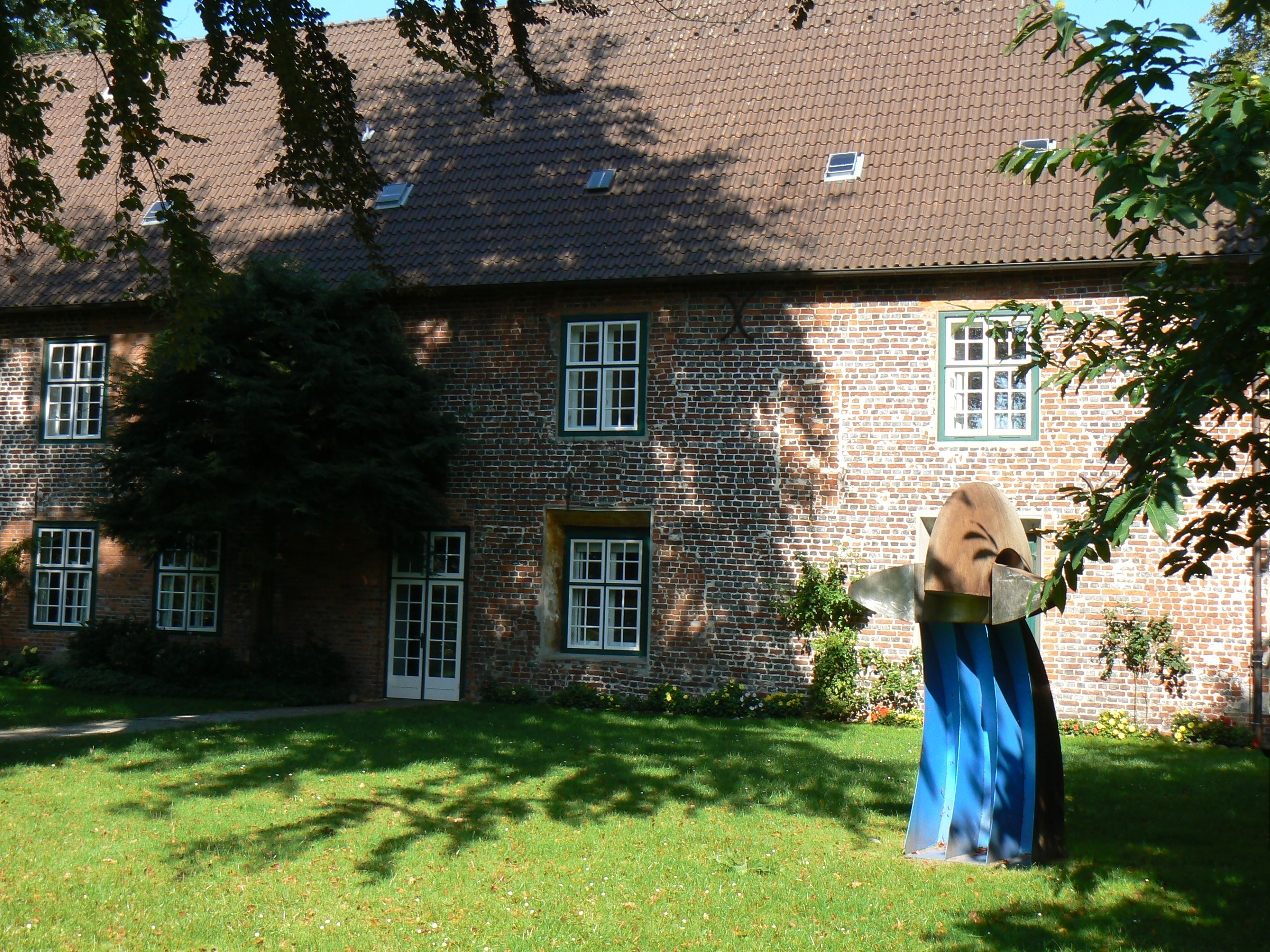 Schloss Neuenburg mit skulptur Leonard Wübbena in Zetel/Germany